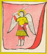 В 1735 году царевич Вахушти составил атлас, в который включил рисунки знамён Грузии и подвластных ей земель. Согласно этому атласу Грузии принадлежали два знамени: - "знамя красное с изображением Святого Георгия на коне, поражающего копьём дракона, с небес выходит божья десница, надевающая на всадника корону"; -"в розовом поле ангел с поднятым мечом и ножнами"